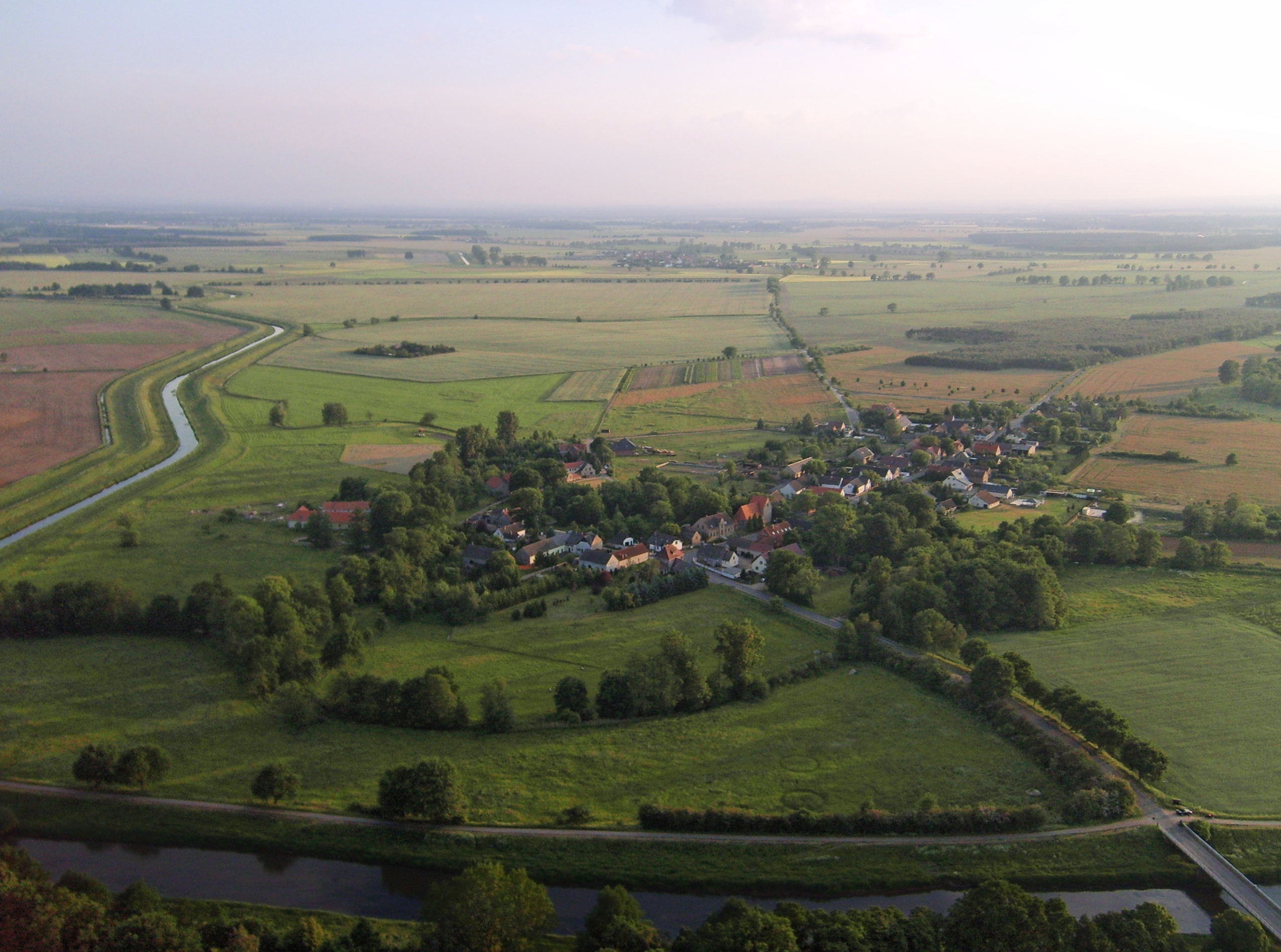 Der Ort Würdenhain aus der Luft. Im Vordergrund ist die Schwarze Elster zu sehen. Im Hintergrund der Oppach.